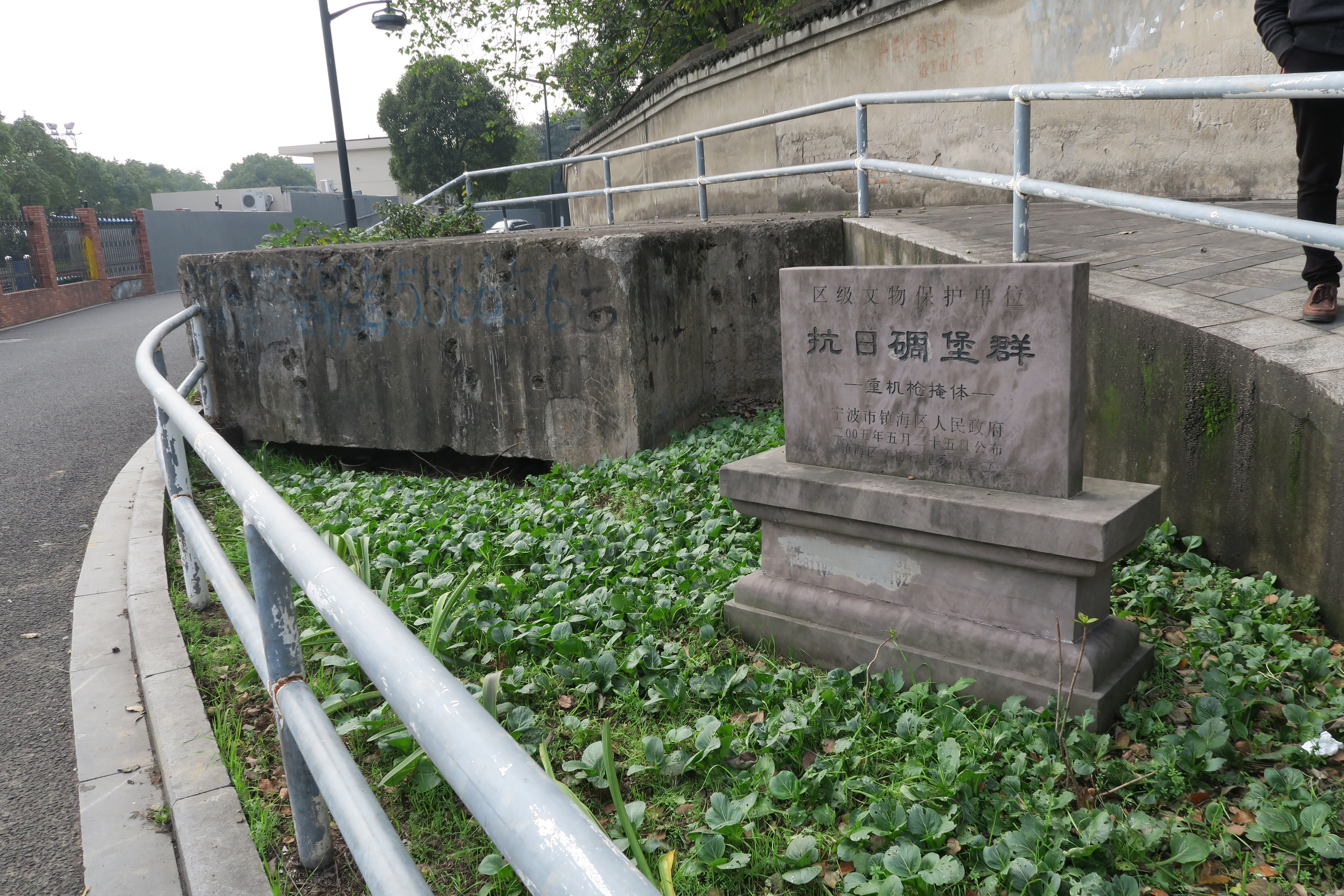 镇海抗日碉堡群